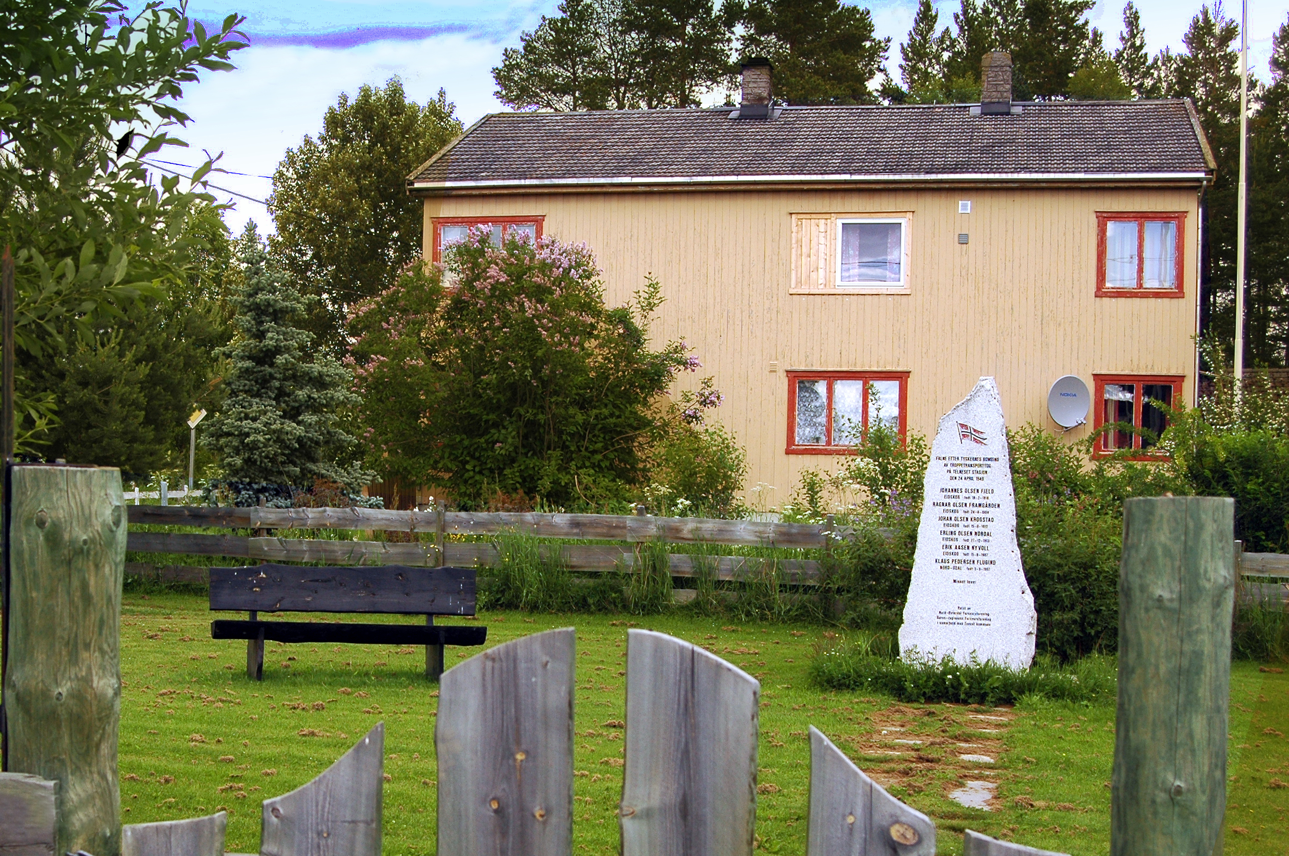 Telneset i Tynset med Minnelund og de falne etter bombeangrepet den 24.april-1940. Foto av Thor Helge Sømåen